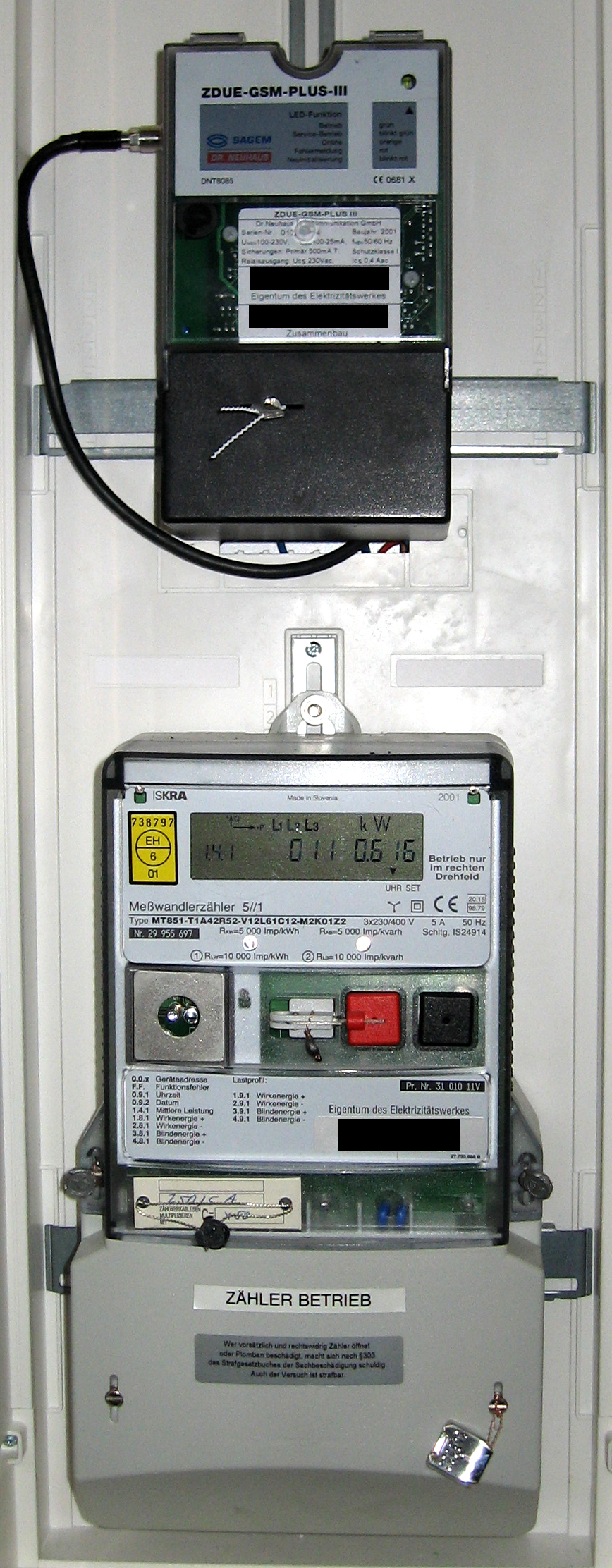 Wandlerzählersatz für Registrierende Leistungsmessung. Die Übermittlung der Zählerdaten erfolgt per GSM-Modem (oben). Der Stromzähler (unten) erfasst Leistung, Arbeit und Blindarbeit, und liefert Impulse für eine Maximumüberwachung.